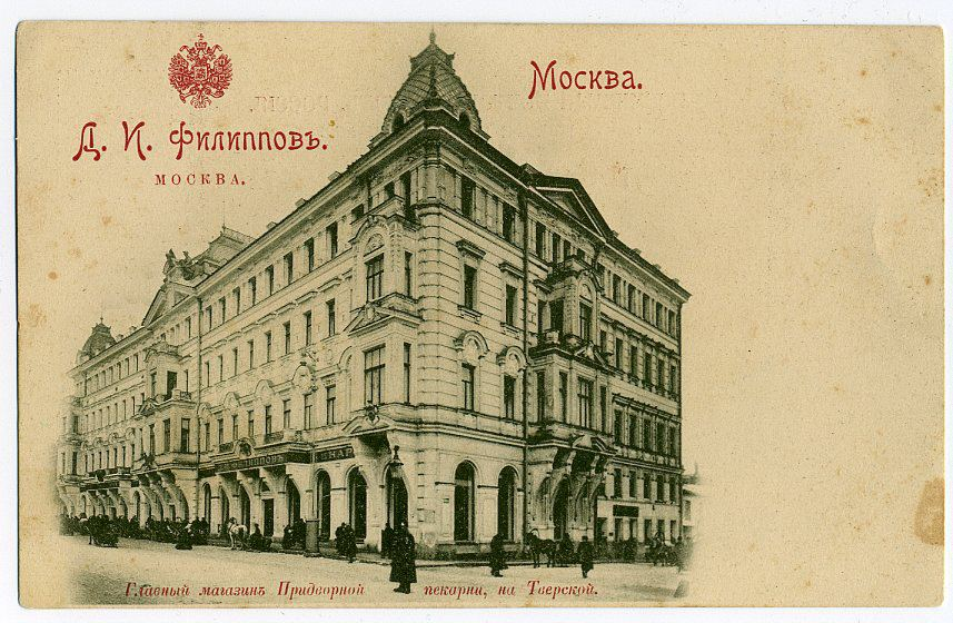 Главная булочная Филиппова на Тверской